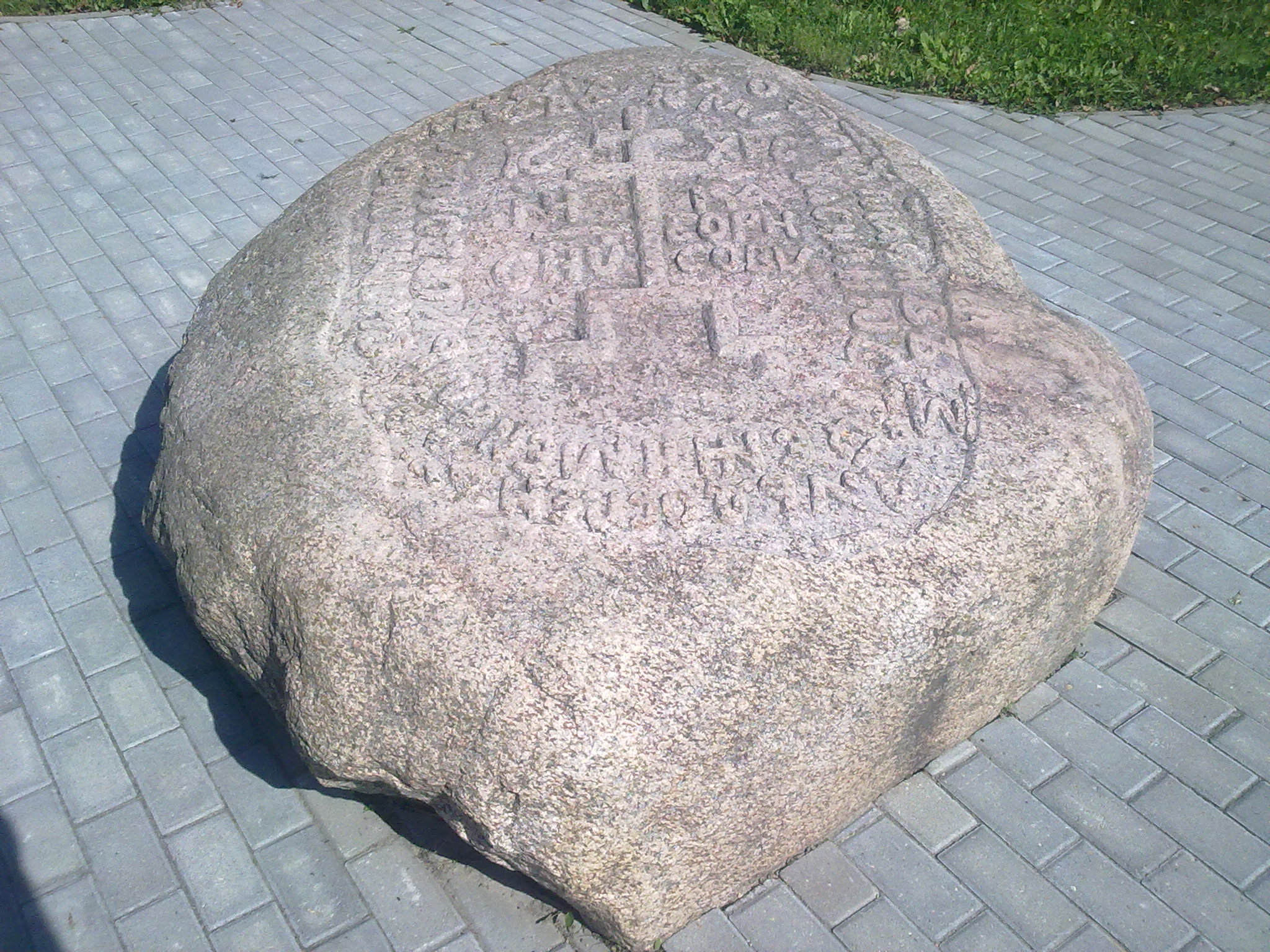 Копия Рогволдового камня, расположенная рядом с Музеем истории и культуры города Орши, Беларусь